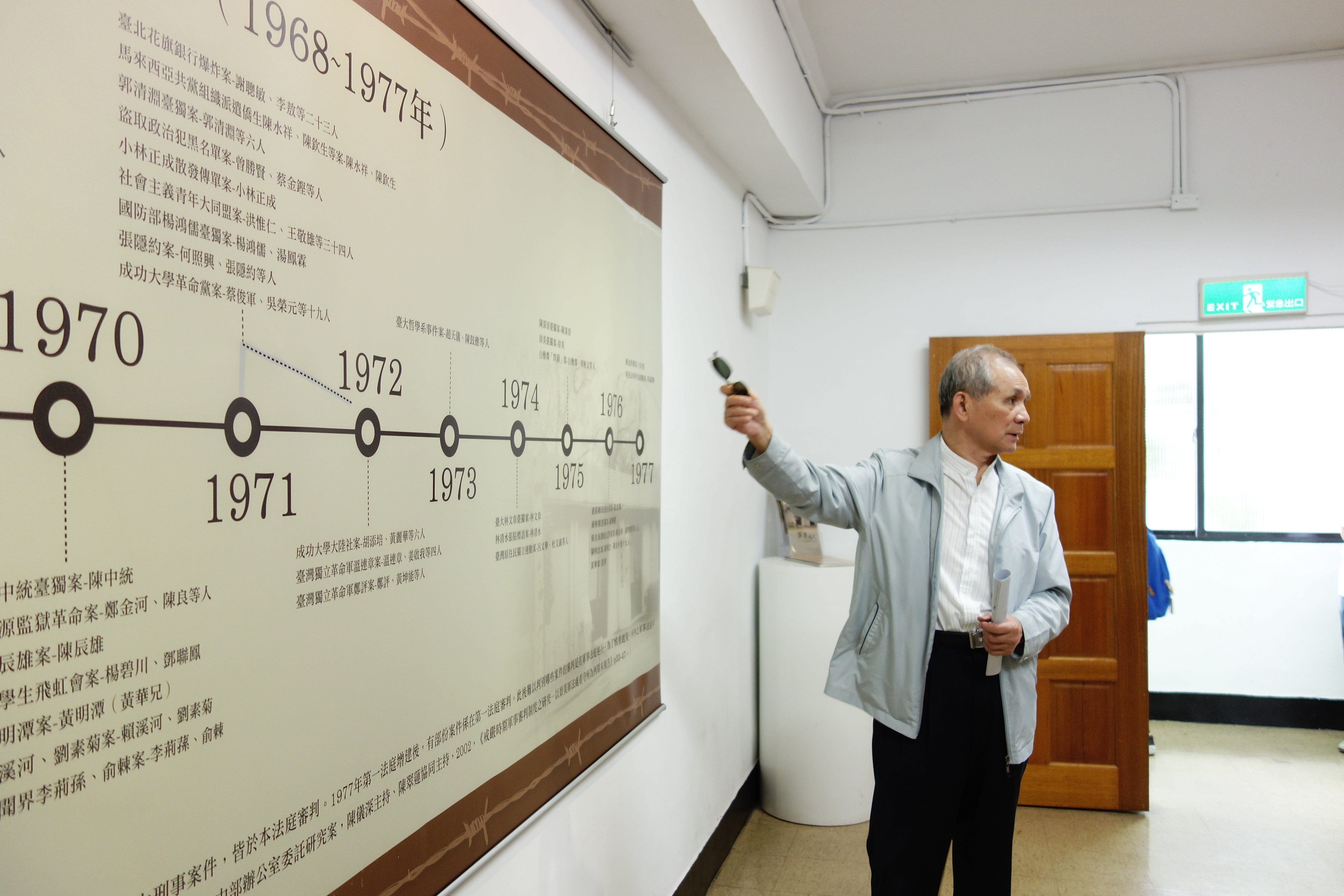 促進轉型正義委員會主任委員黃煌雄詢問白色恐怖景美紀念園區展示內容。